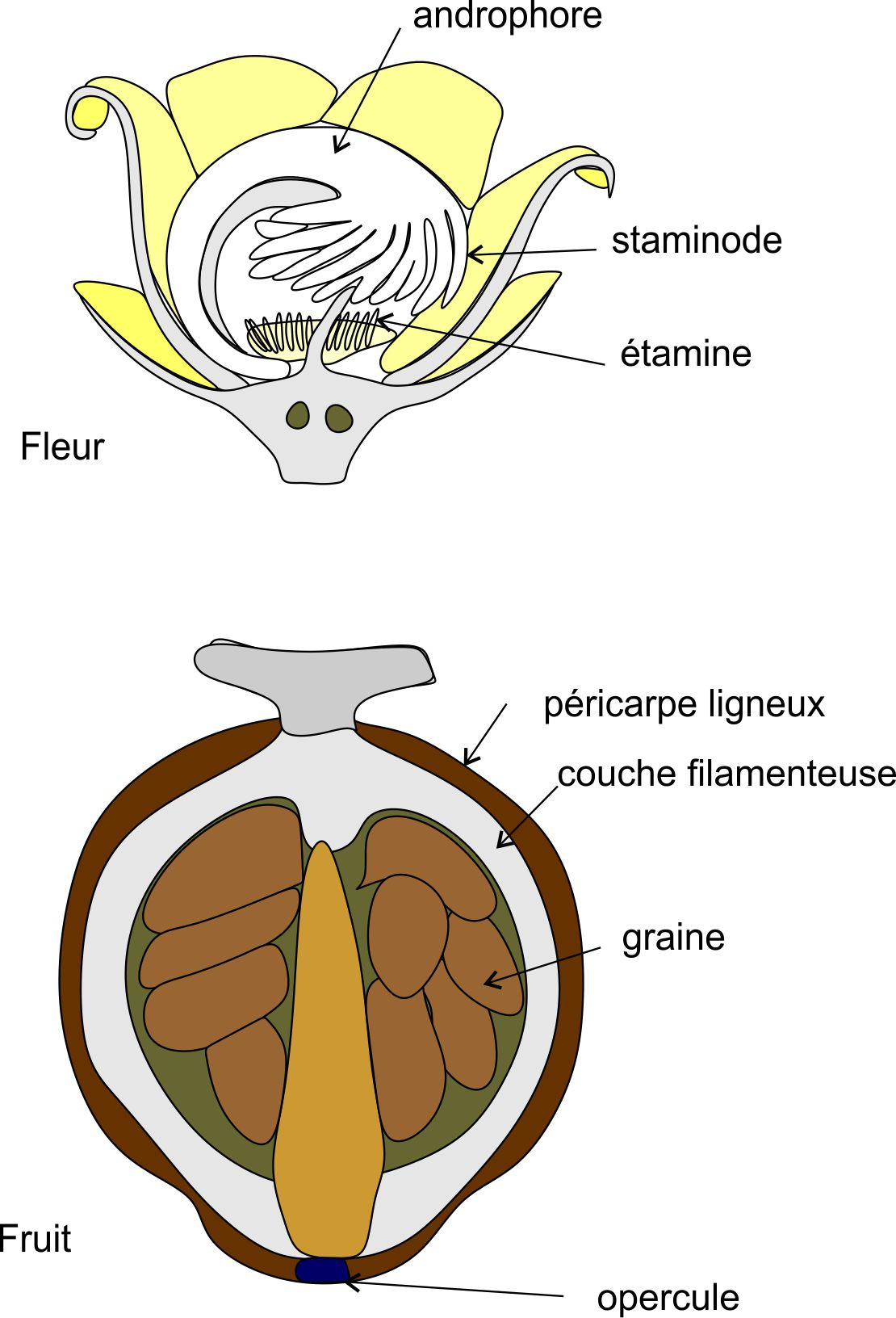 Dessin inspiré de Marc Gazel, Les Lécythidacées : flore forestière de Guyane, Silvolab Guyane, 1992